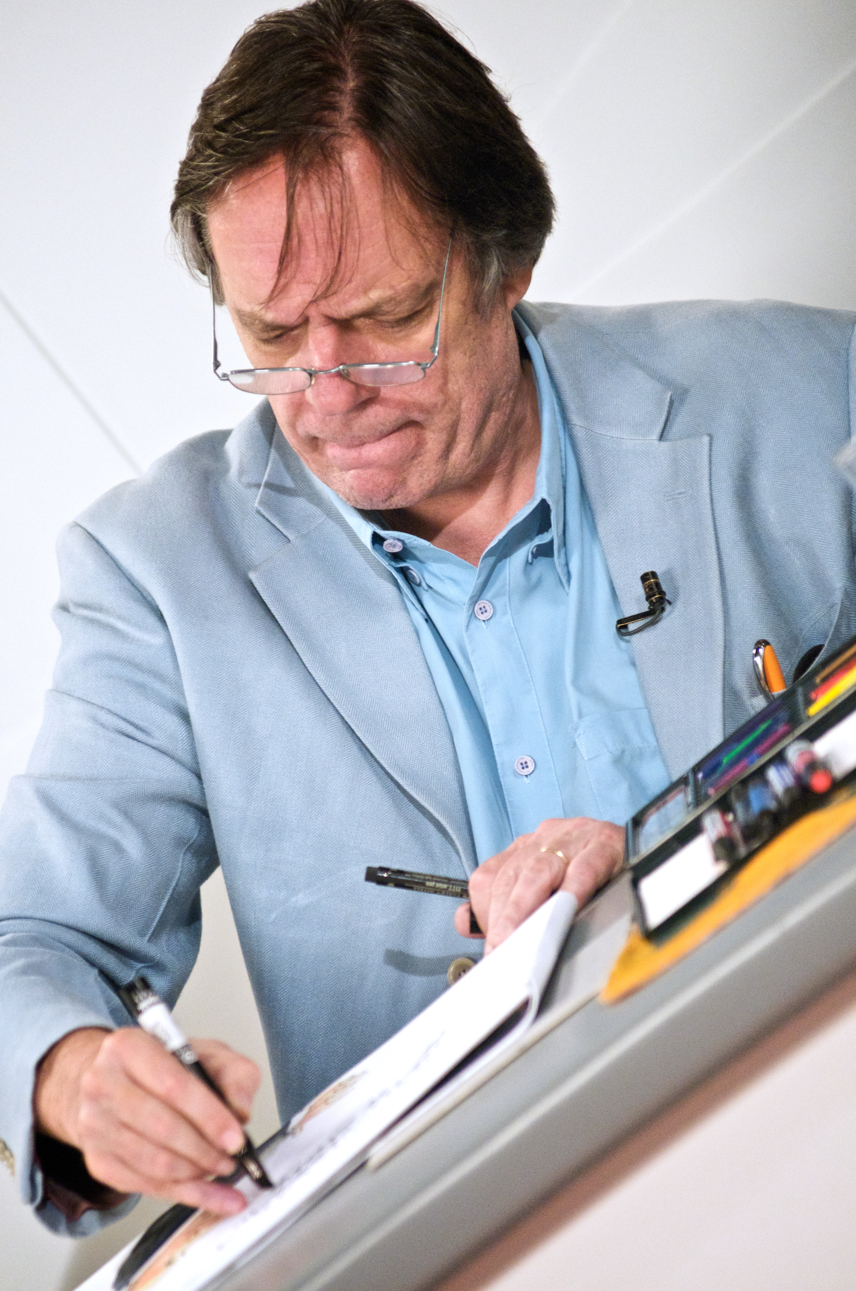 Foto: Silvio Tanaka